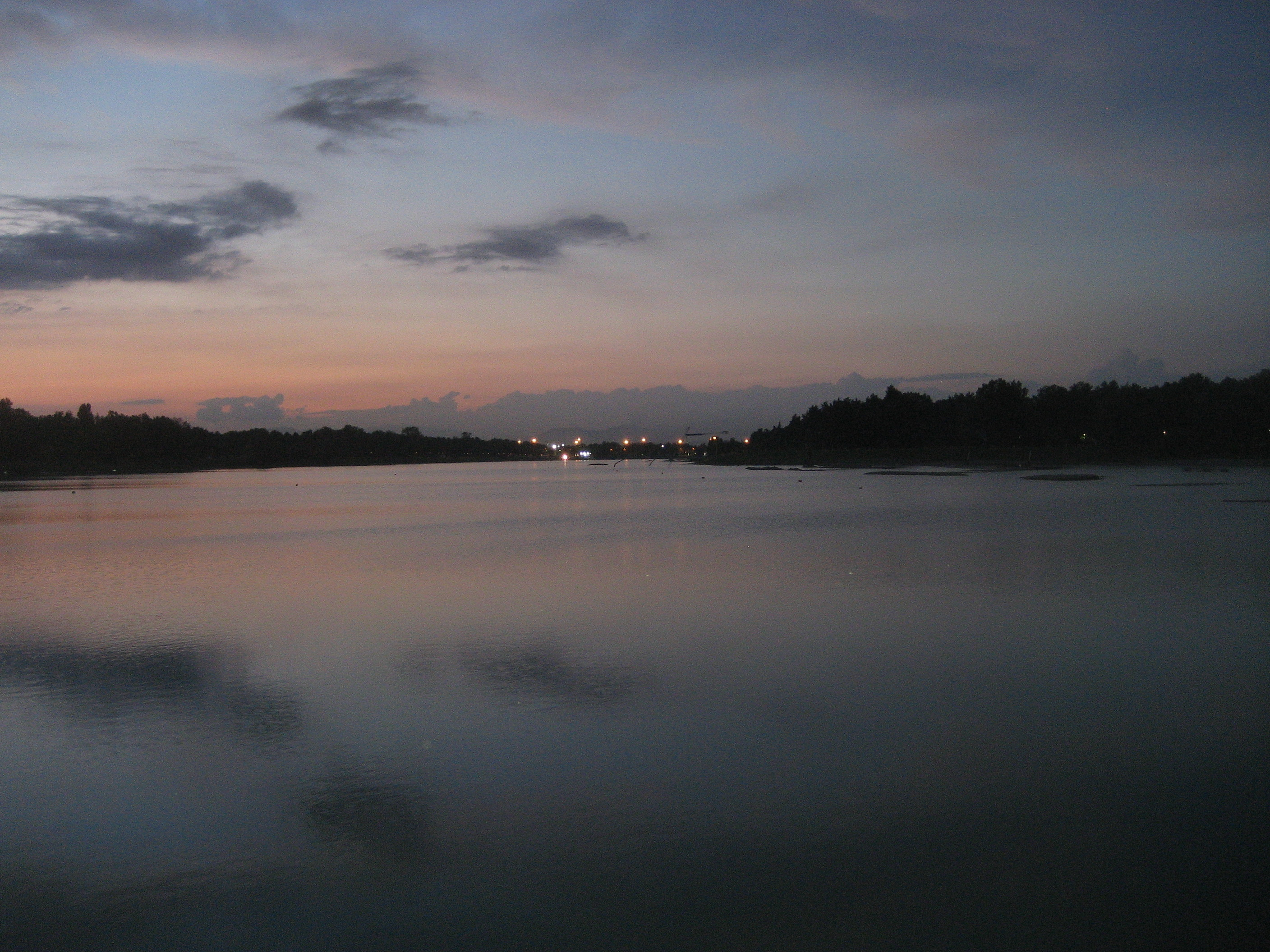 Tramonto sull'Idroscalo di Milano.